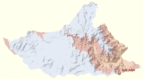 Mapa de Aucará